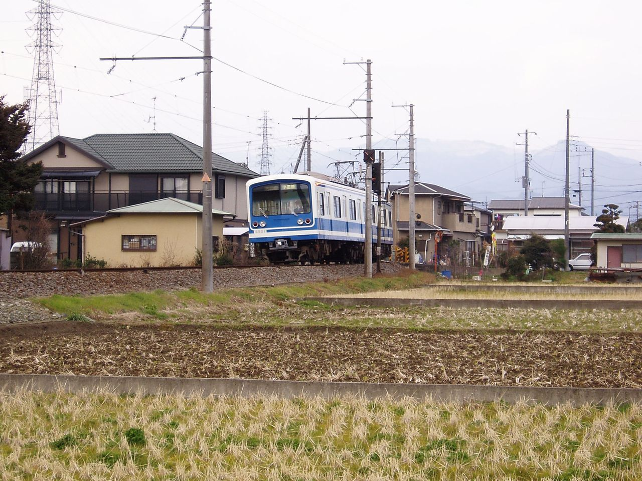 at between Tsukahara Sta. and Wadagahara Sta. at Iwahara Sta.